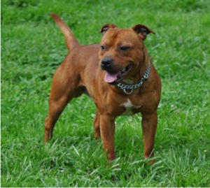 Camawach el natchez wyrd